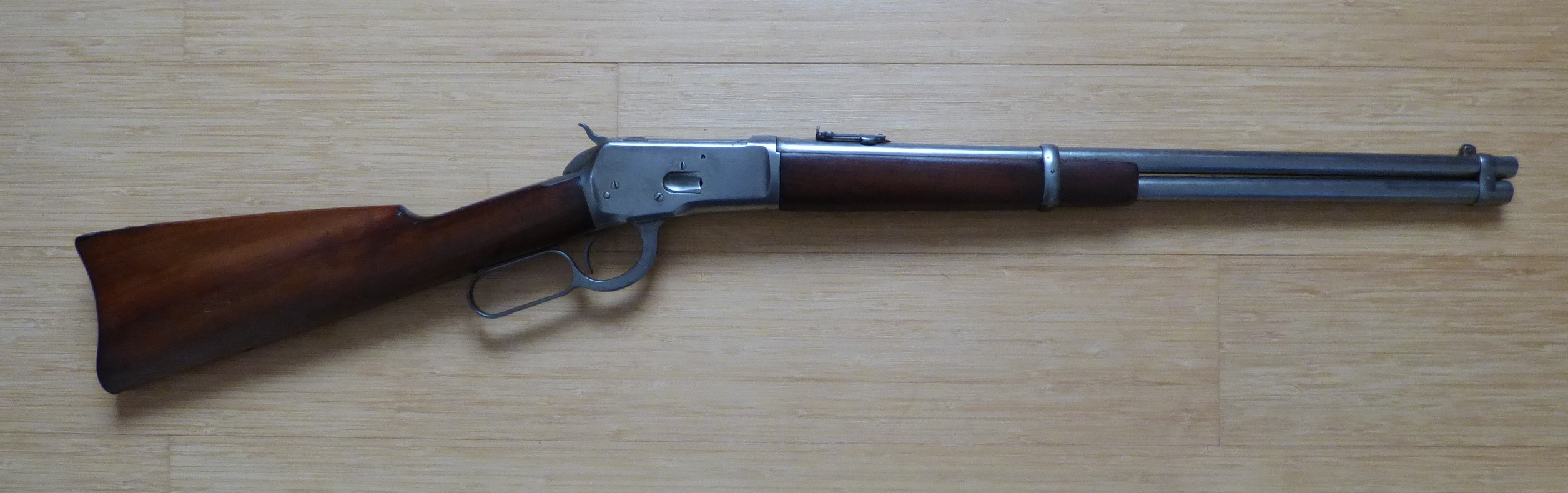 Winchester 1892 versions mousqueton vue en entier du côté droit.